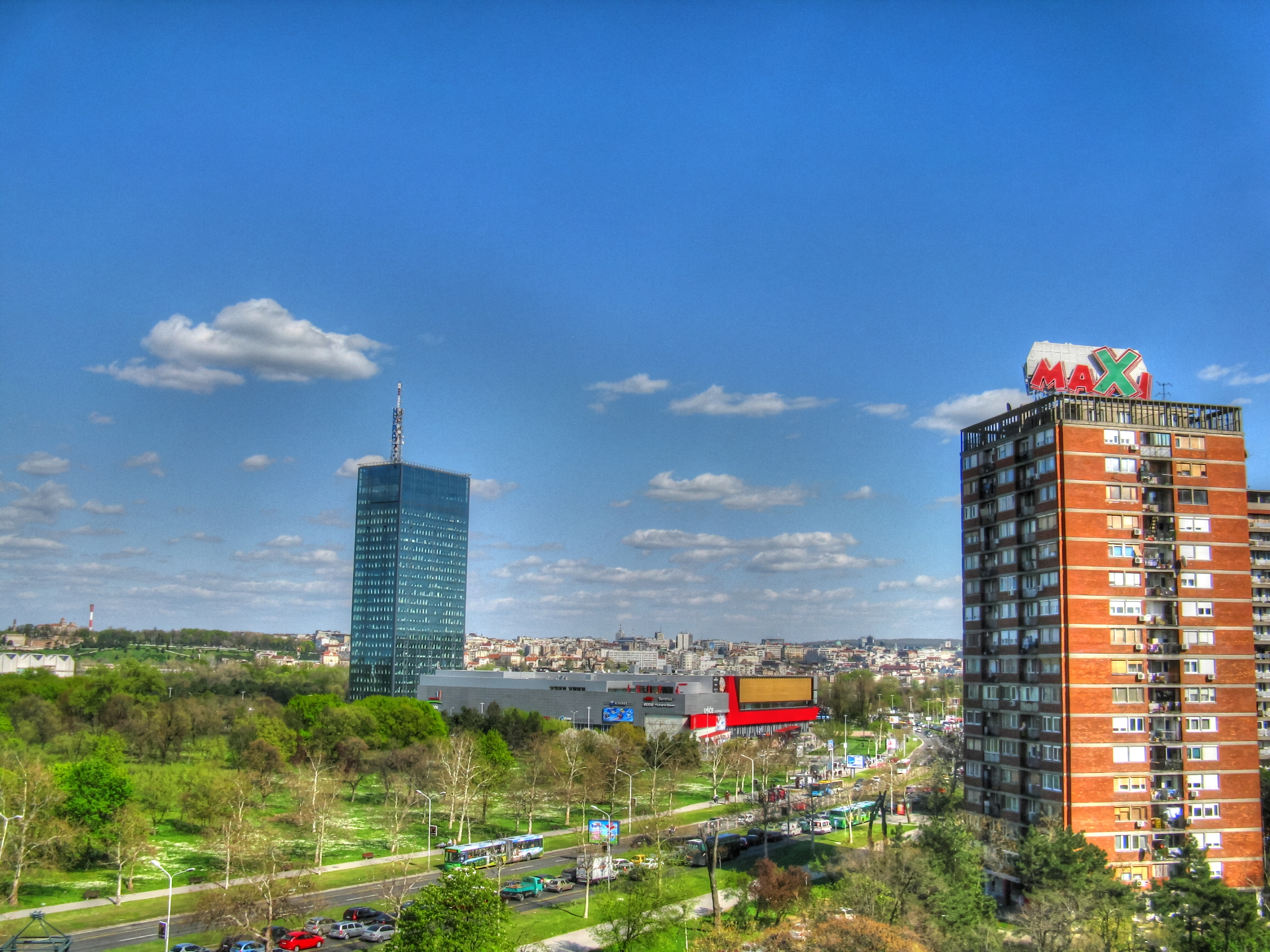 Belgrade